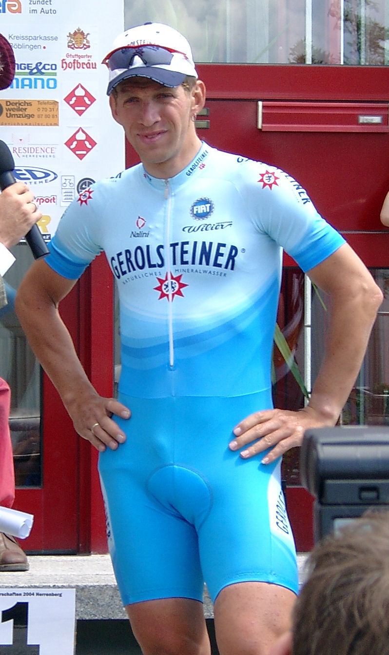 Michael Rich